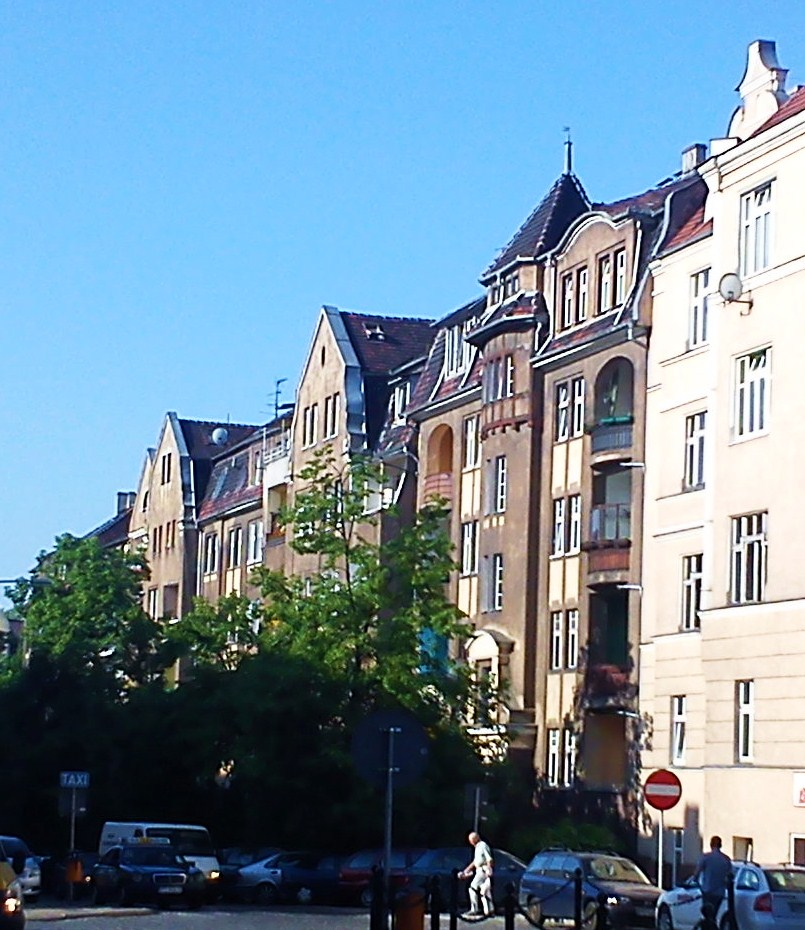 Poznań, ul. Wierzbięcice 49-59.